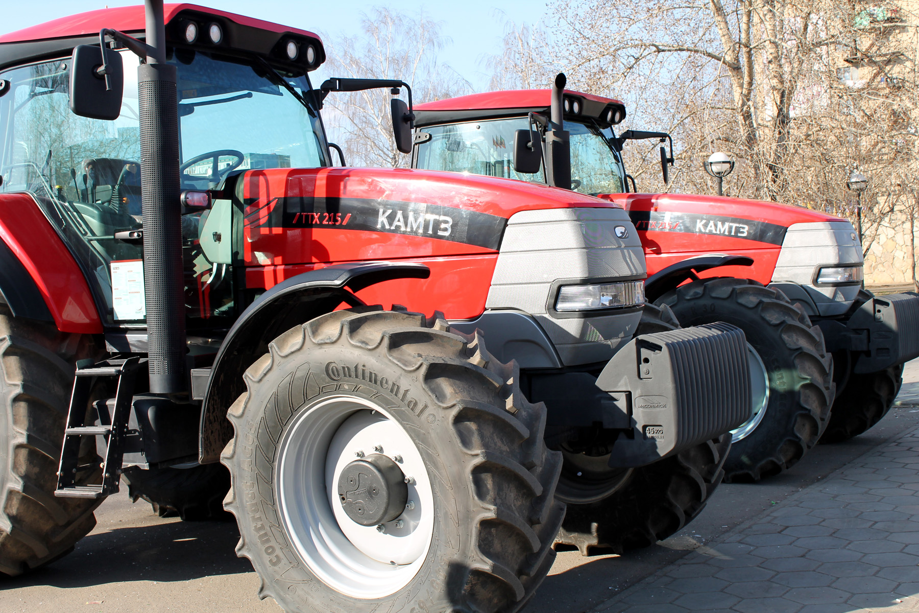 Презентация трактора ТТХ 215 в Набережных Челнах